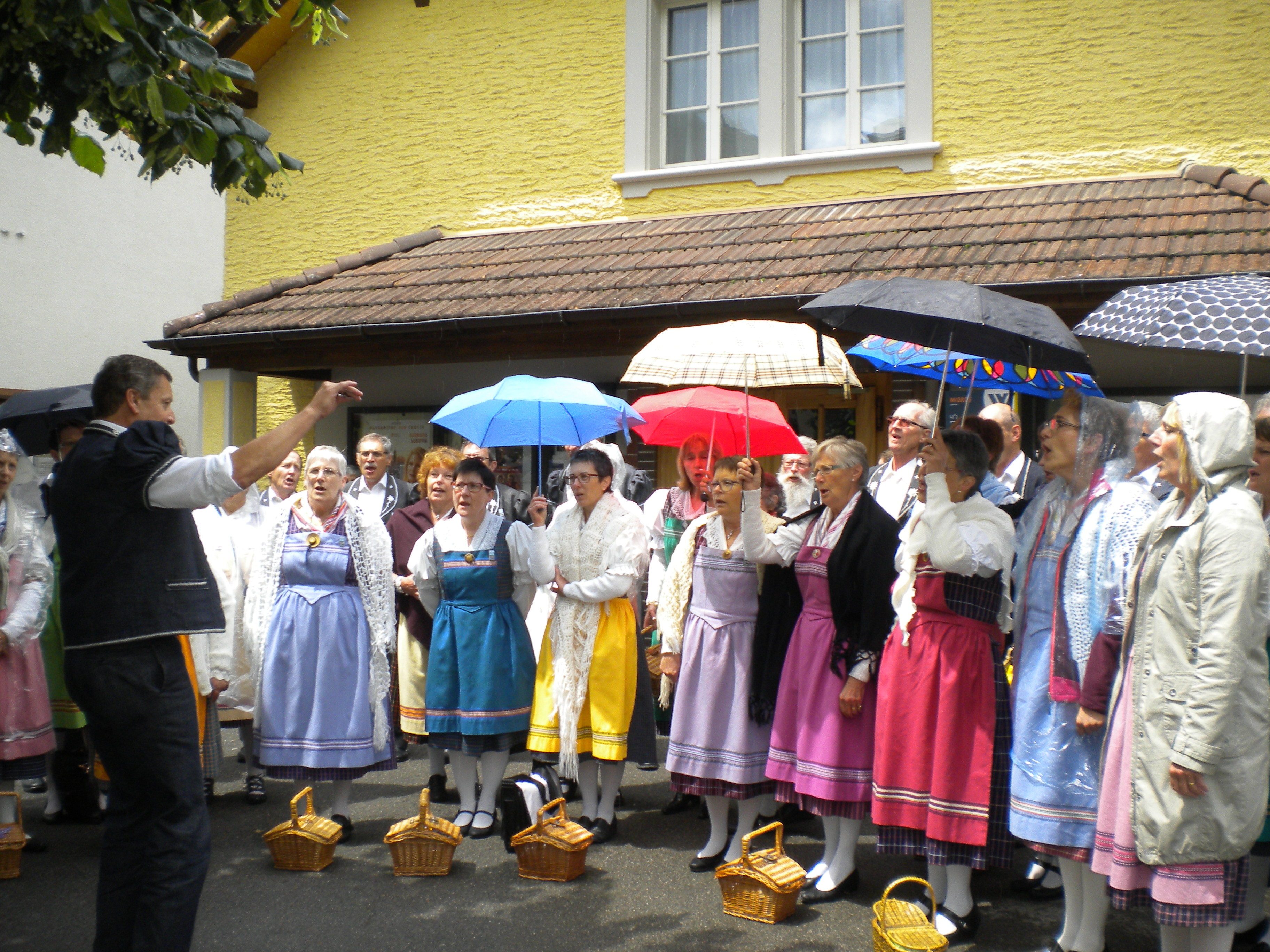 Schweizer Gesangsfest 2015, Meiringen BE, Schweiz